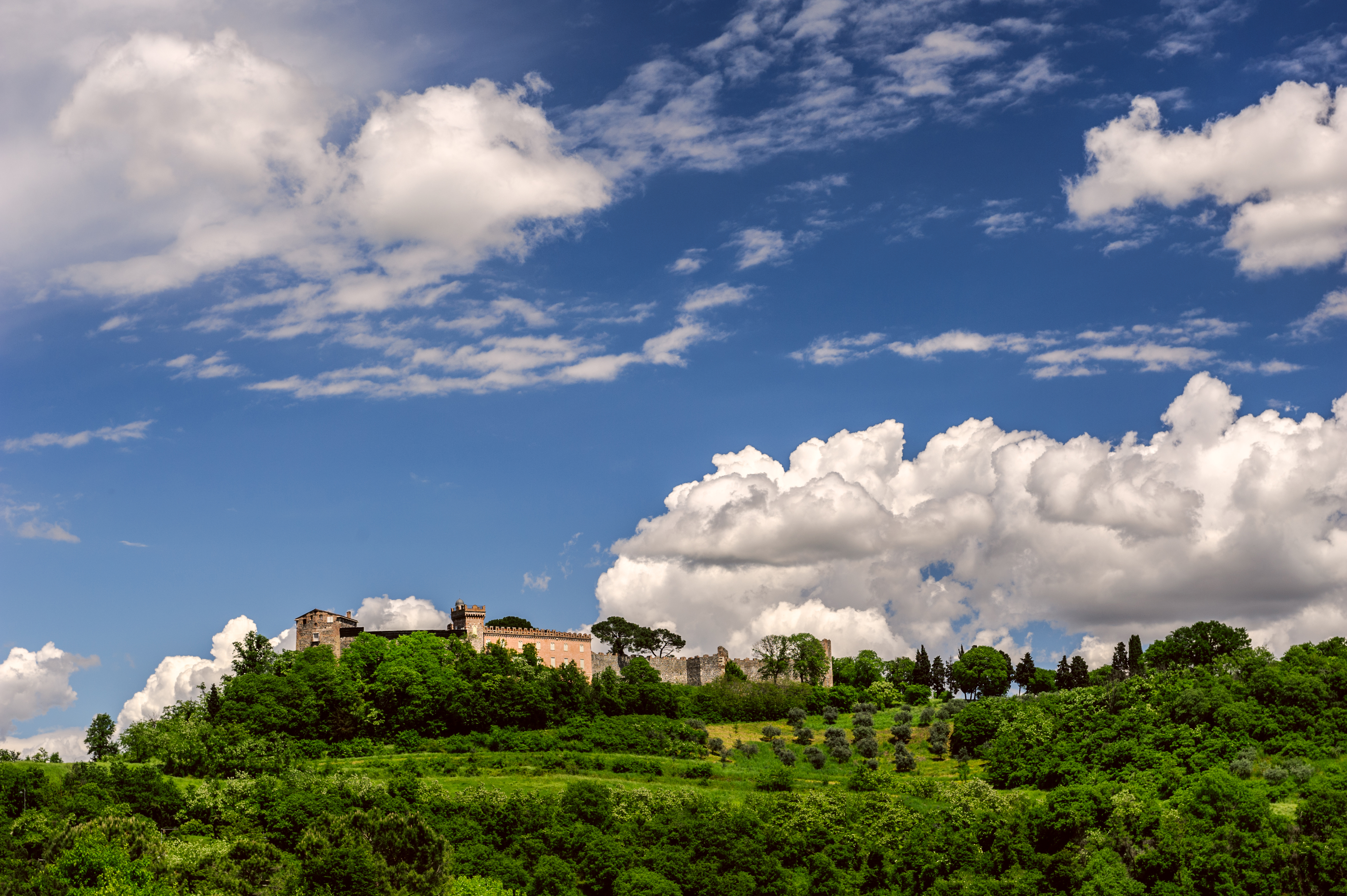 Castello dei Maltraversi This is a photo of a monument which is part of cultural heritage of Italy.